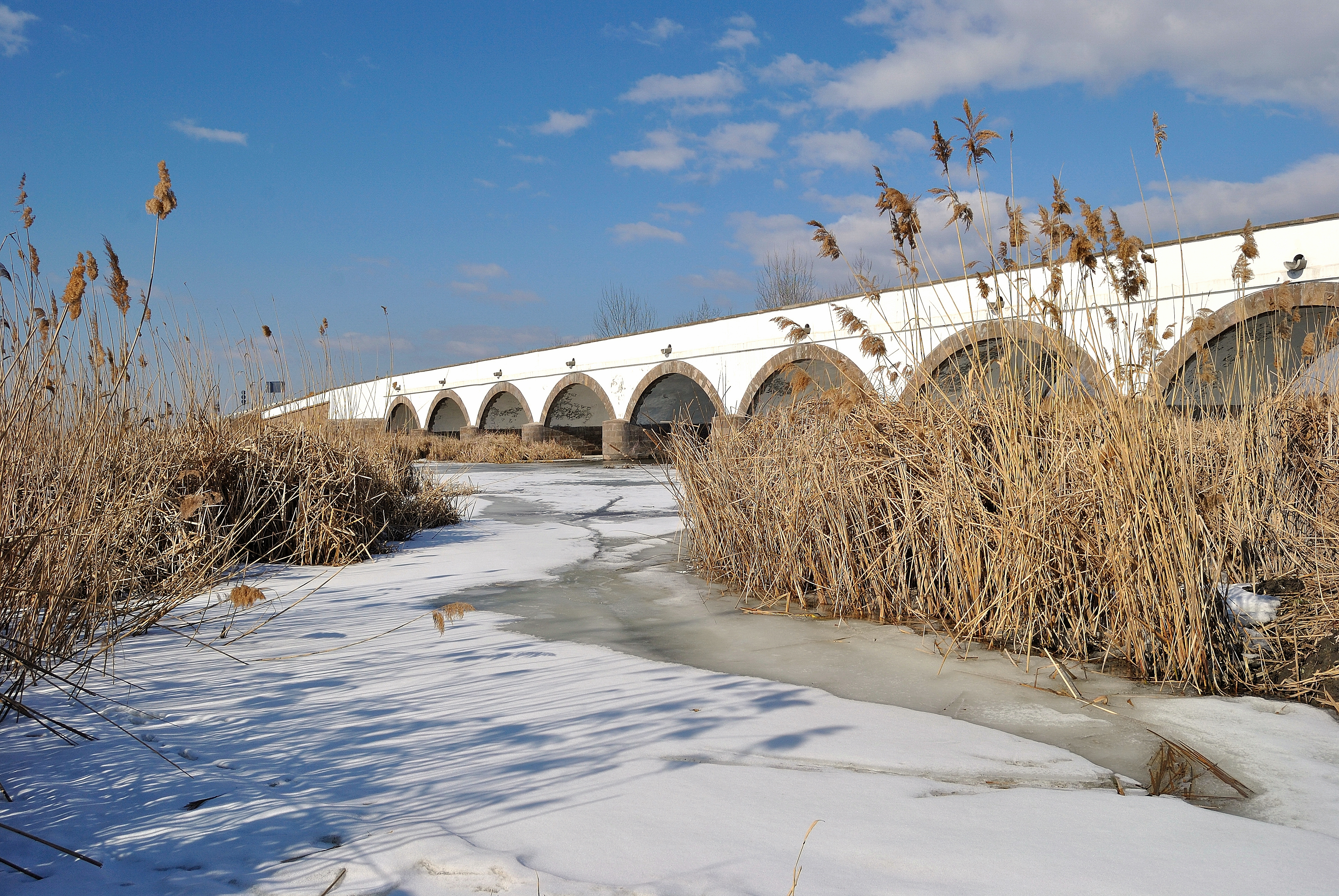 Nagyhortobágyi kőhíd This is a photo of a monument in Hungary. Identifier: 5334